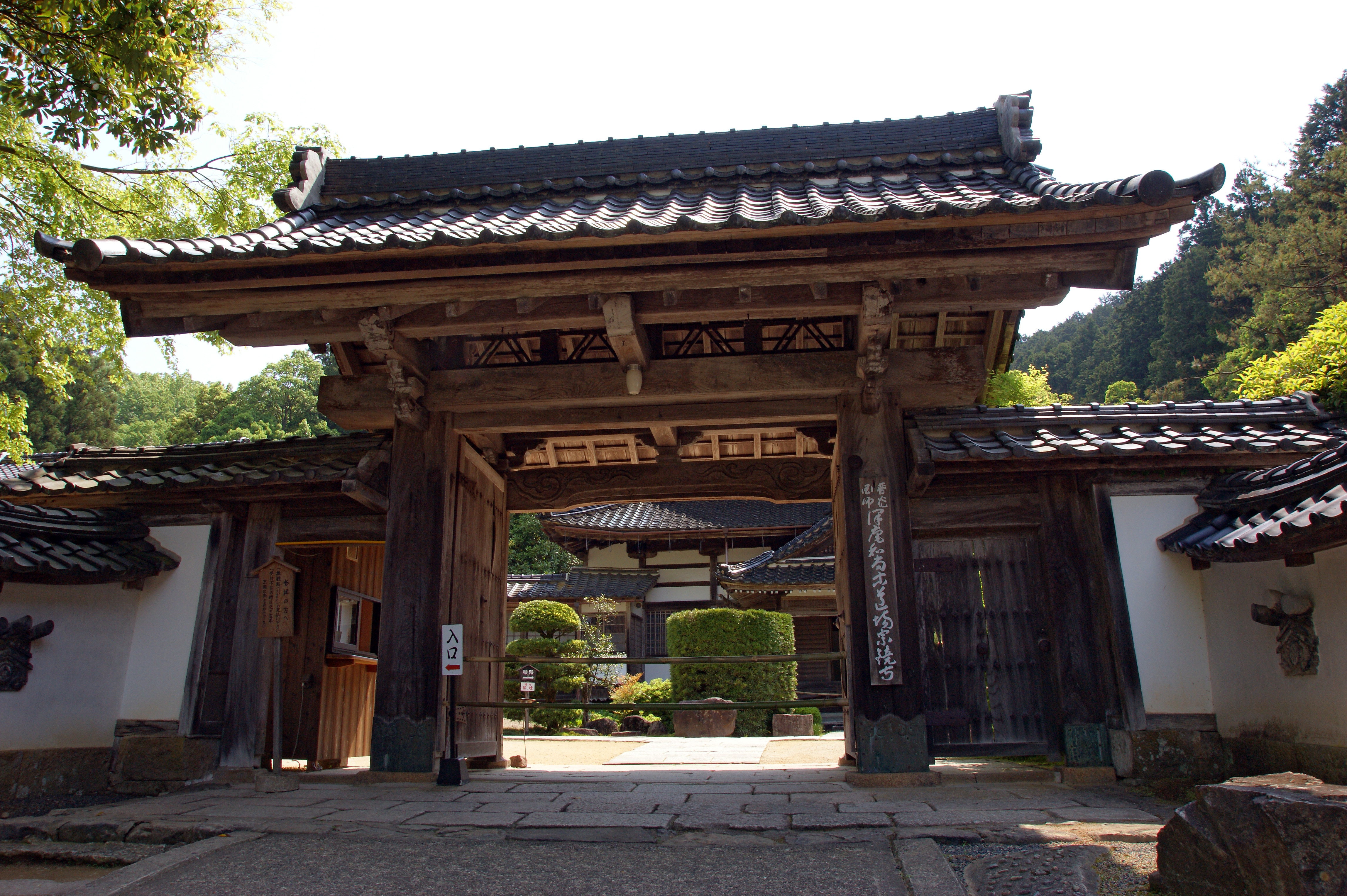 Sukyoji in Izushi, Toyooka, Hyogo prefecture, Japan